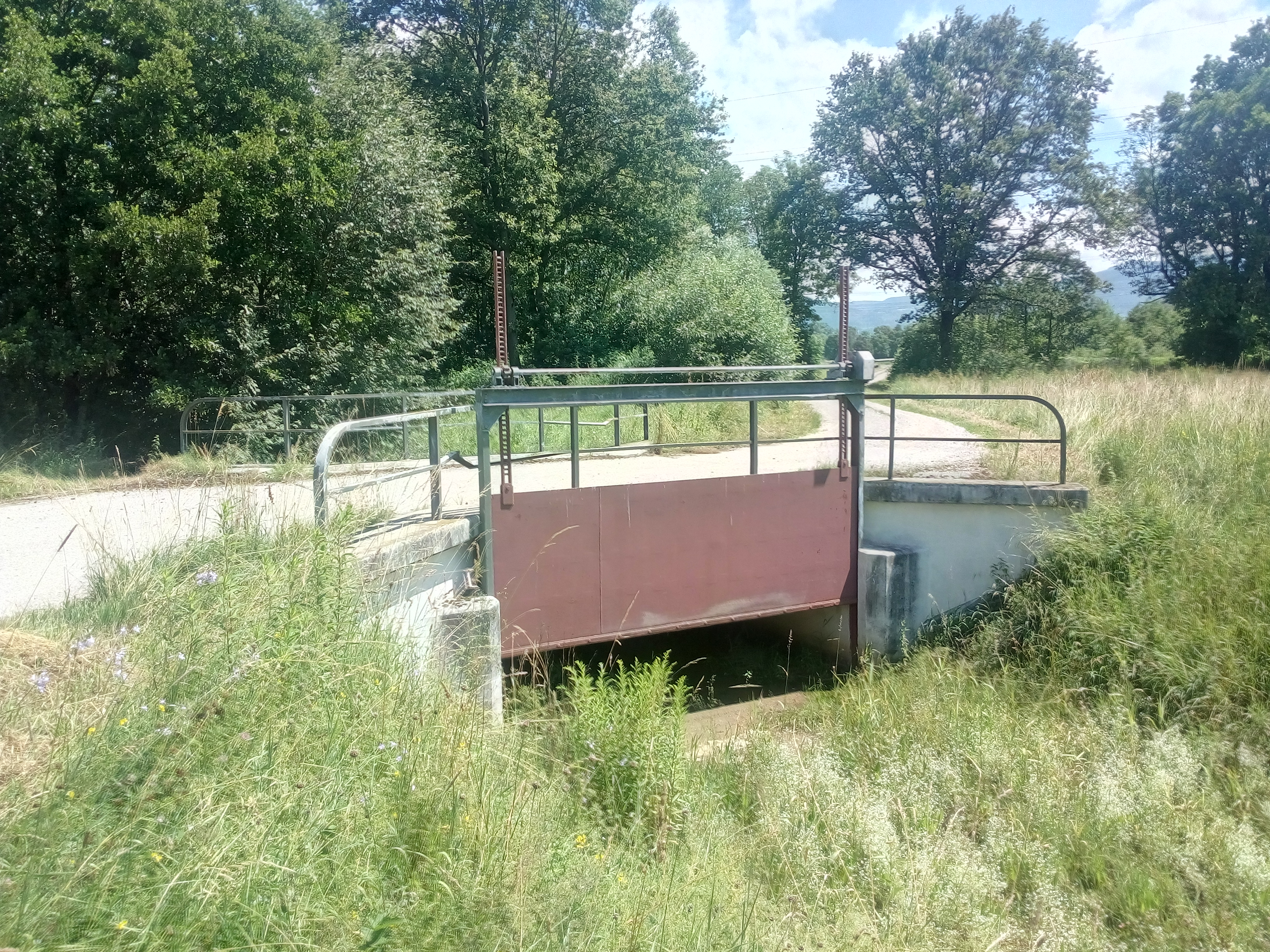 Brücke und Stauwehr am Fuchsgraben (Oberlauf des Scheidgrabens), Gemeinde Sasbach